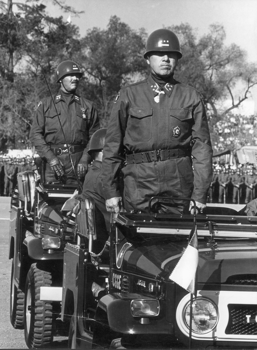 General Augusto Pinochet Ugarte, en la Parada Militar.